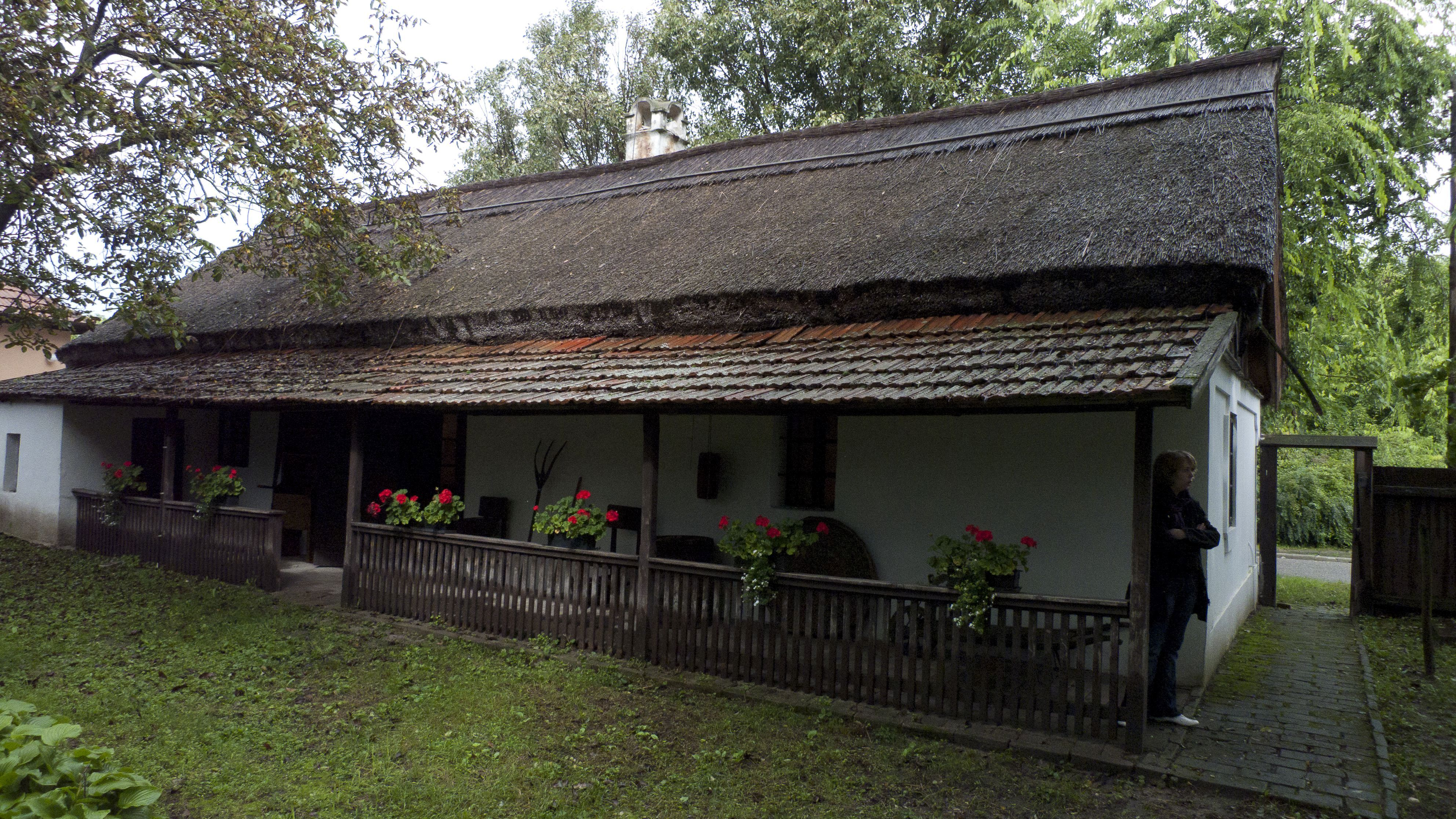 Kiskunhalasi tájház